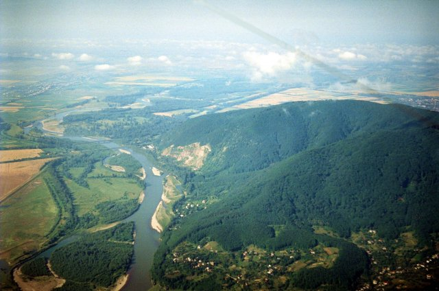 A nagyszőlősi Fekete-hegy (Kárpátalja, Ukrajna)